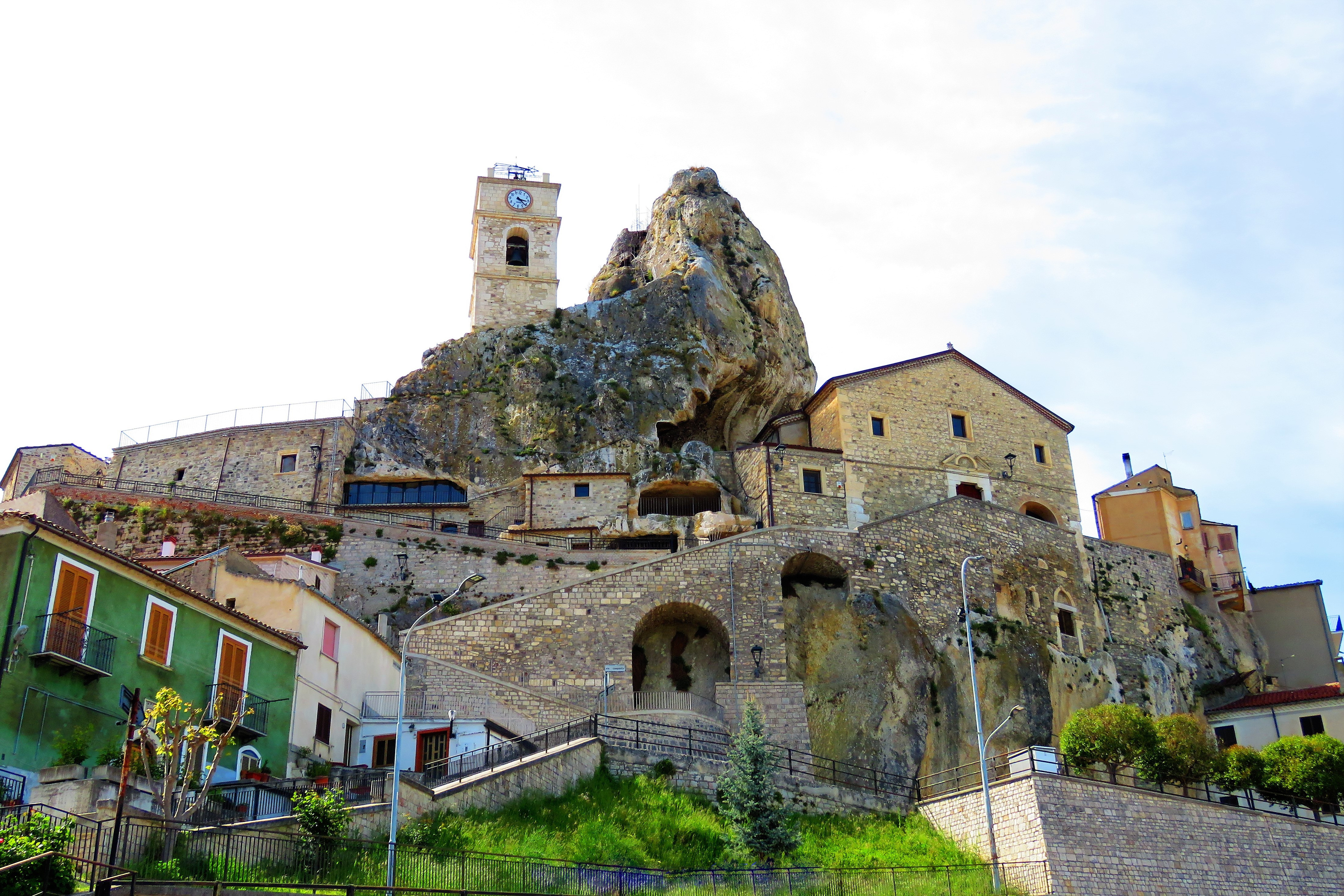 Pietracupa